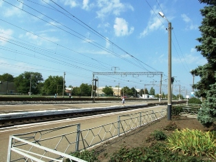 Вокзал поселка матвеев курган